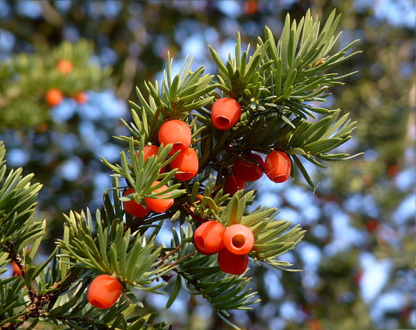 Fruchtstaende der Eibe